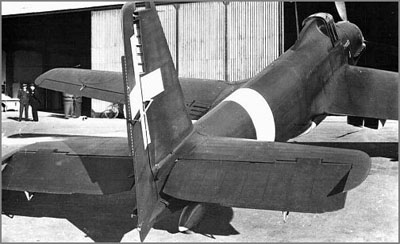 Breda Ba.202, prototipo di bombardiere italiano. Categoria:Immagini di aeroplani